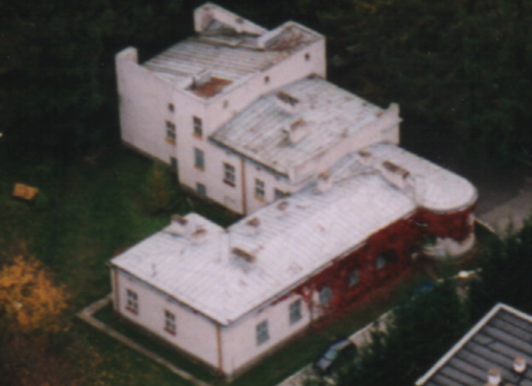 1988 Strażnica Rutka Tartak KOP WOP SG